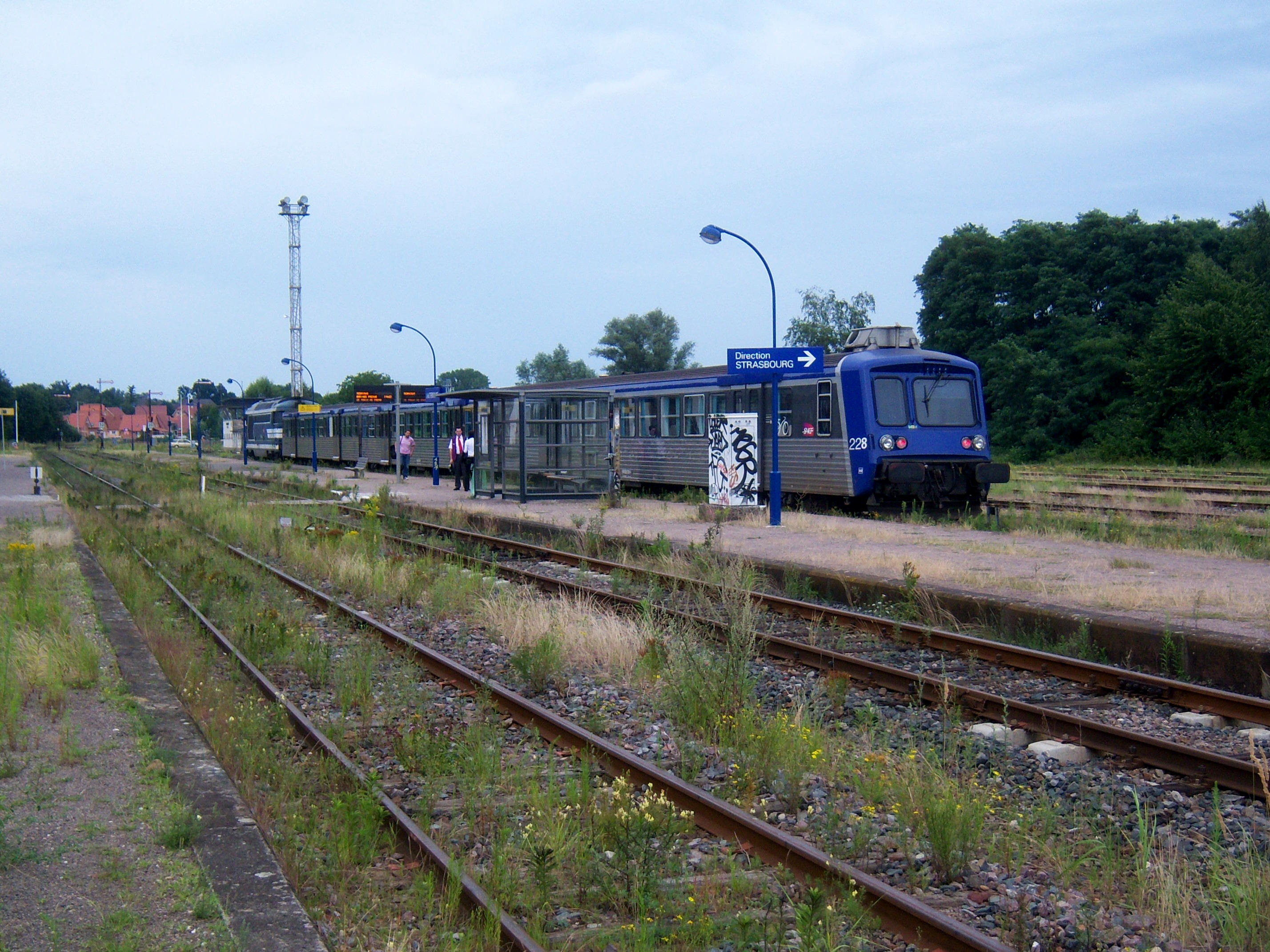 Szenerie am Lauterbourger Bahnhof in Frankreich